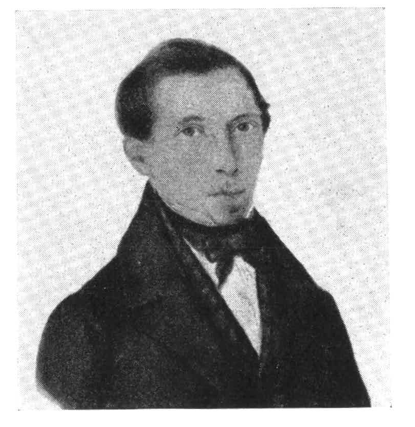 Aquarellierte Bleistiftzeichnung, die wp:Emil Flechsig (1808-1878), einen Jugendfreund von Robert Schumann zeigt.